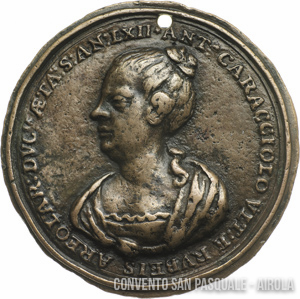 Medaglia posa della prima pietra Chiesa SS. Concezione di Airola - Raffigurante la Contessa D. Antonia Caracciolo